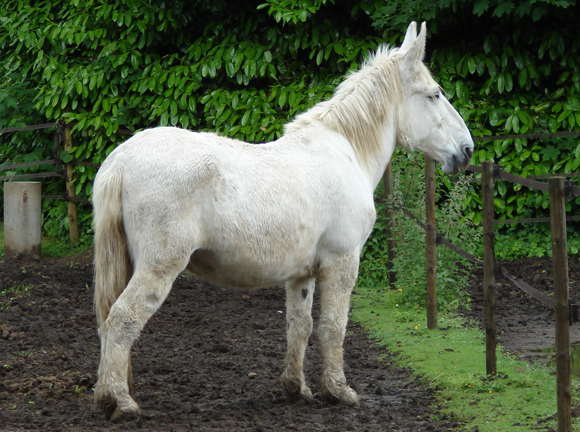 Haras national, Saintes, Poitou-Charentes, France